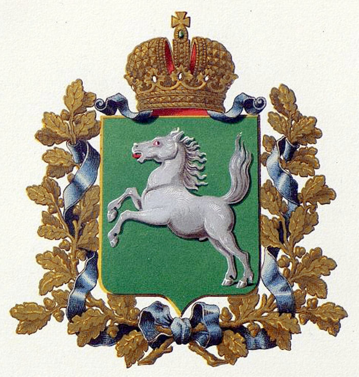 Official Russian Empire coat of arms Tomsk Governorate. Герб Российской Империи Томской губернии в Гербовнике МВД. Утверждён Императором Всероссийским Александром Вторым.